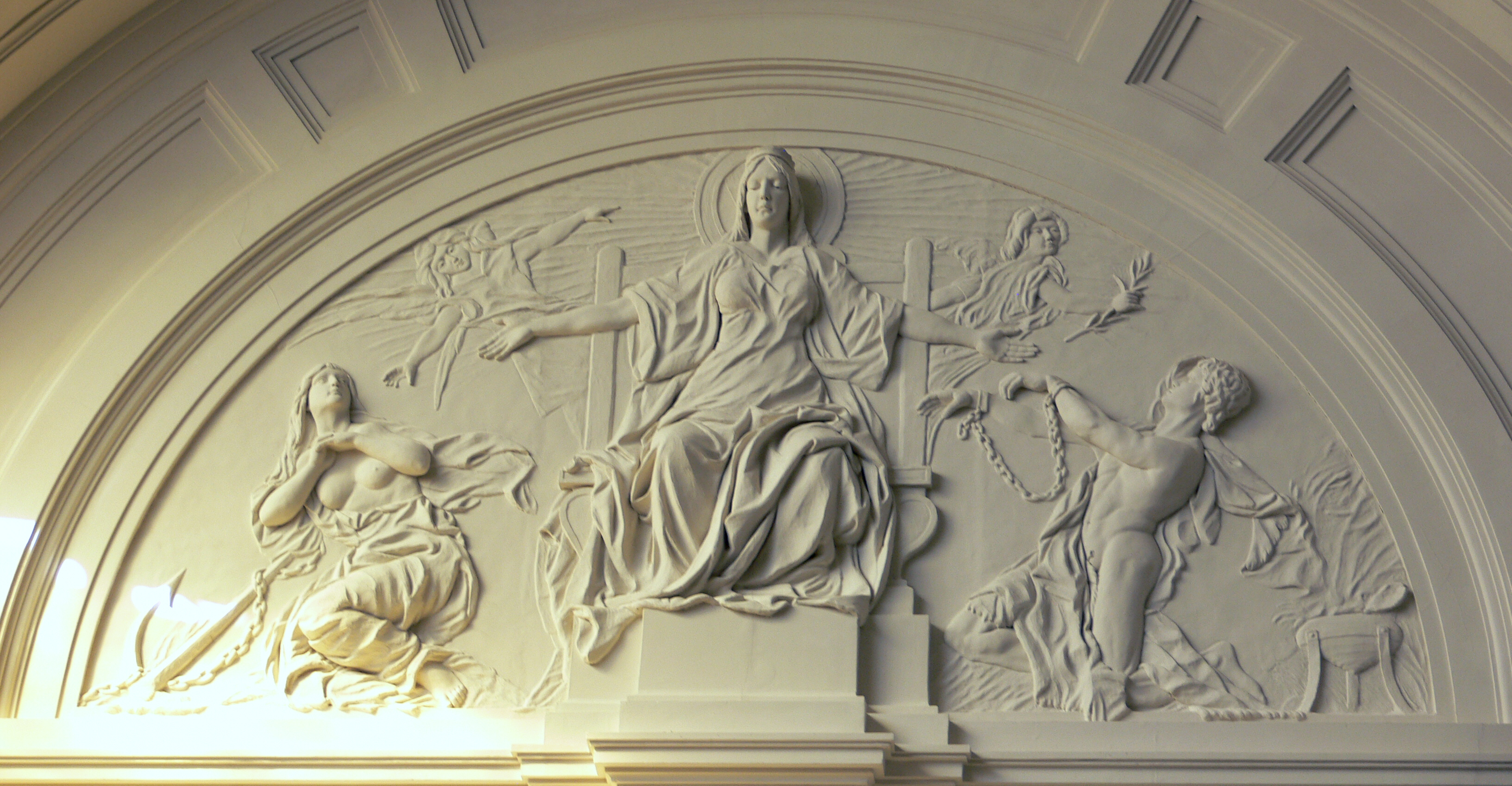 Leipzig, Reichsgerichtsgebäude Wartehalle, Relief "Die Gnade" von Nikolaus Geiger